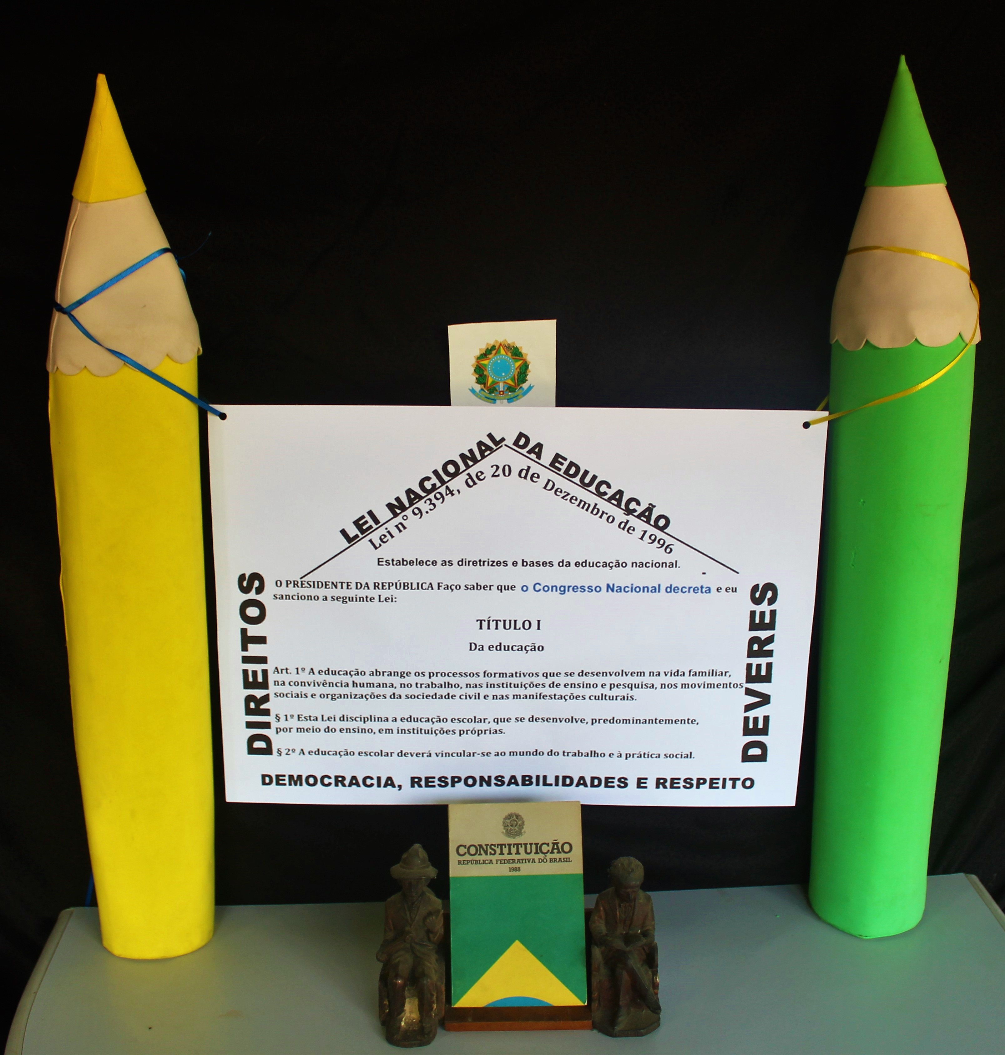 Material sobre a Lei do Brasil número 9697/97. A Lei de Diretrizes e Bases da educação do Brasil. Na parte de baixo a Constituição do Brasil está ladeada por duas mini estátuas, dos anos de 1930, uma de Rui Barbosa e de Santos Dummont.